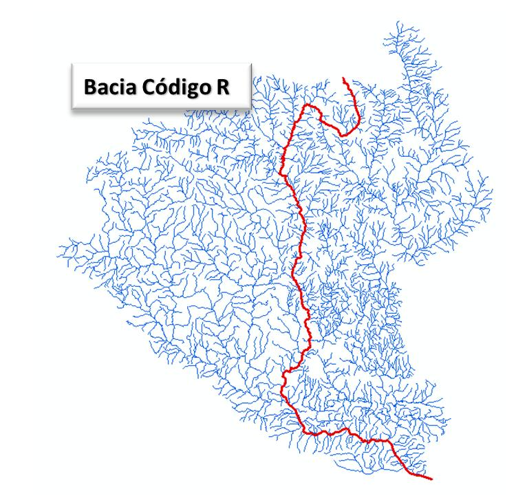 Curso d'água Principal da Bacia do Rio Trombetas determinado pelo critério de maior área de contribuição